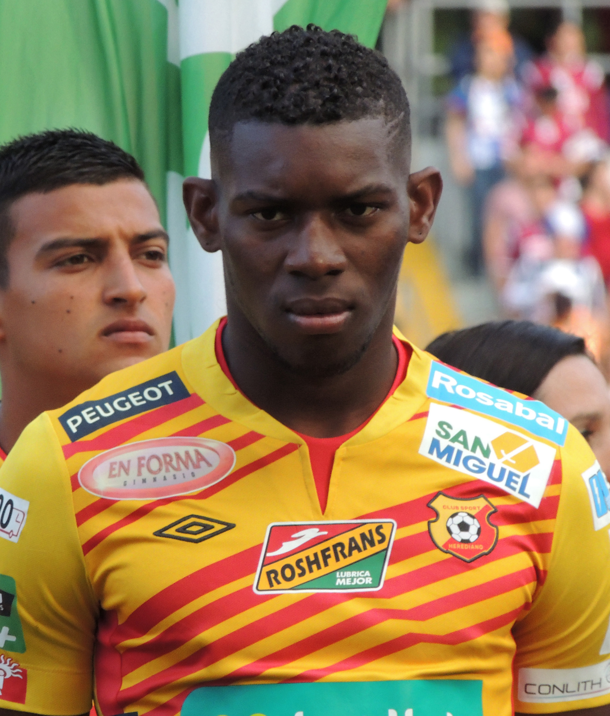 Esta obra de Luis Manuel Madrigal está bajo una licencia de Creative Commons Reconocimiento-CompartirIgual 4.0 Internacional. Para una versión sin logo escriba a